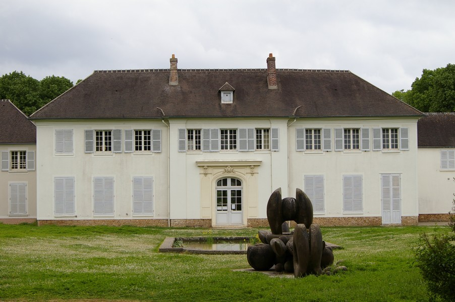 La Faisanderie de Senart côté Jardin